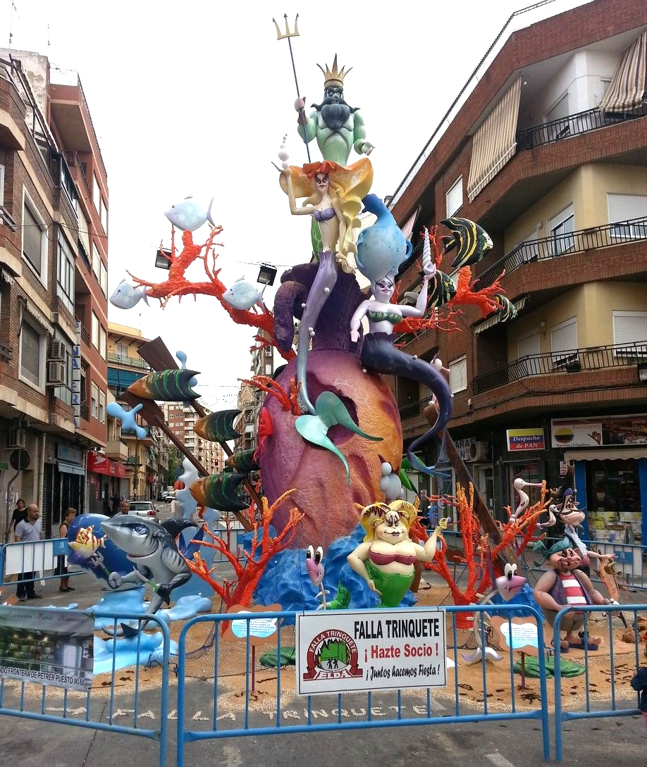 Falla en Elda. Barrio Trinquete